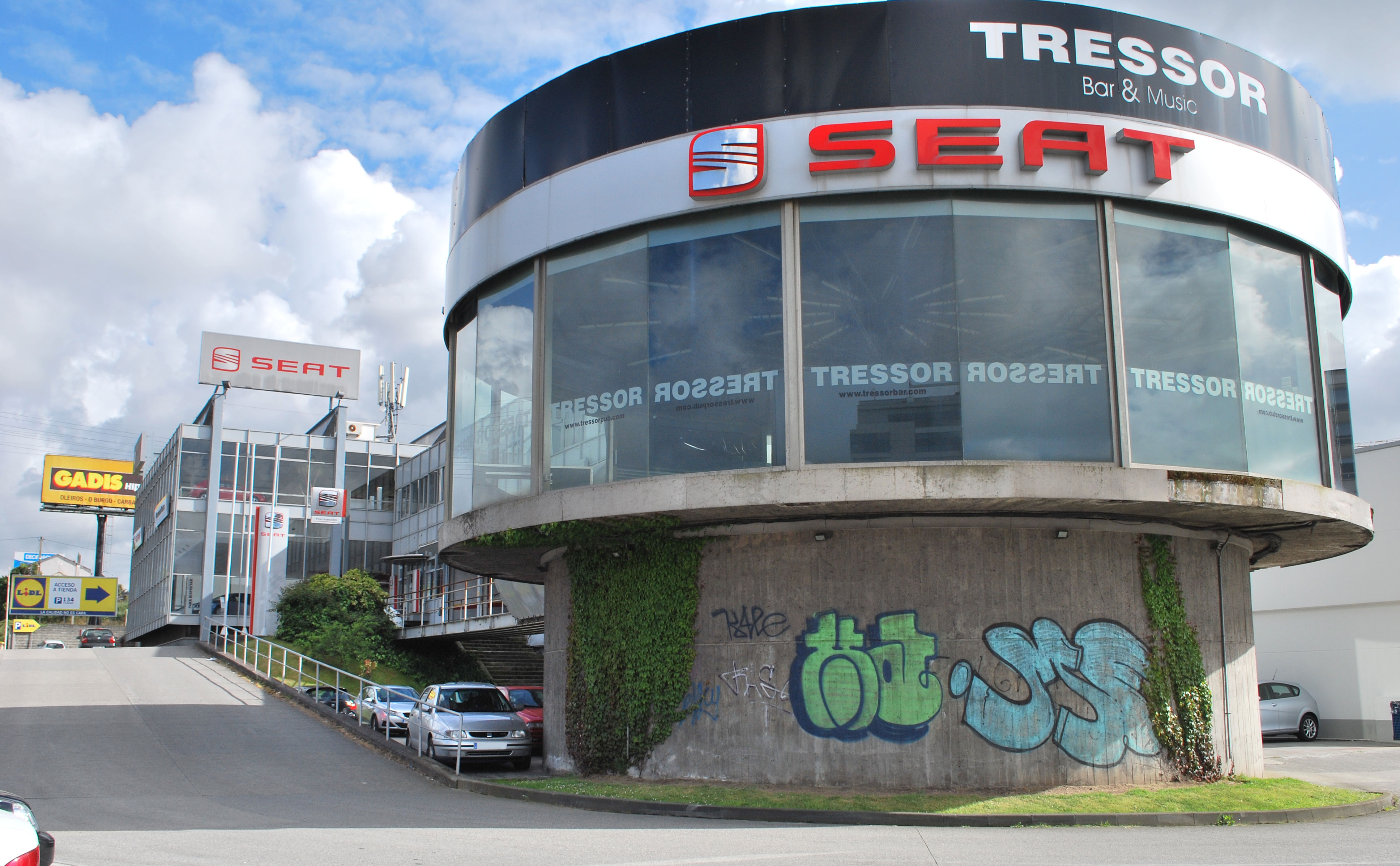 Deseño Andrés Fernández-Albalat Lois na Avda. Alfonso Molina A Coruña Galiza Spain